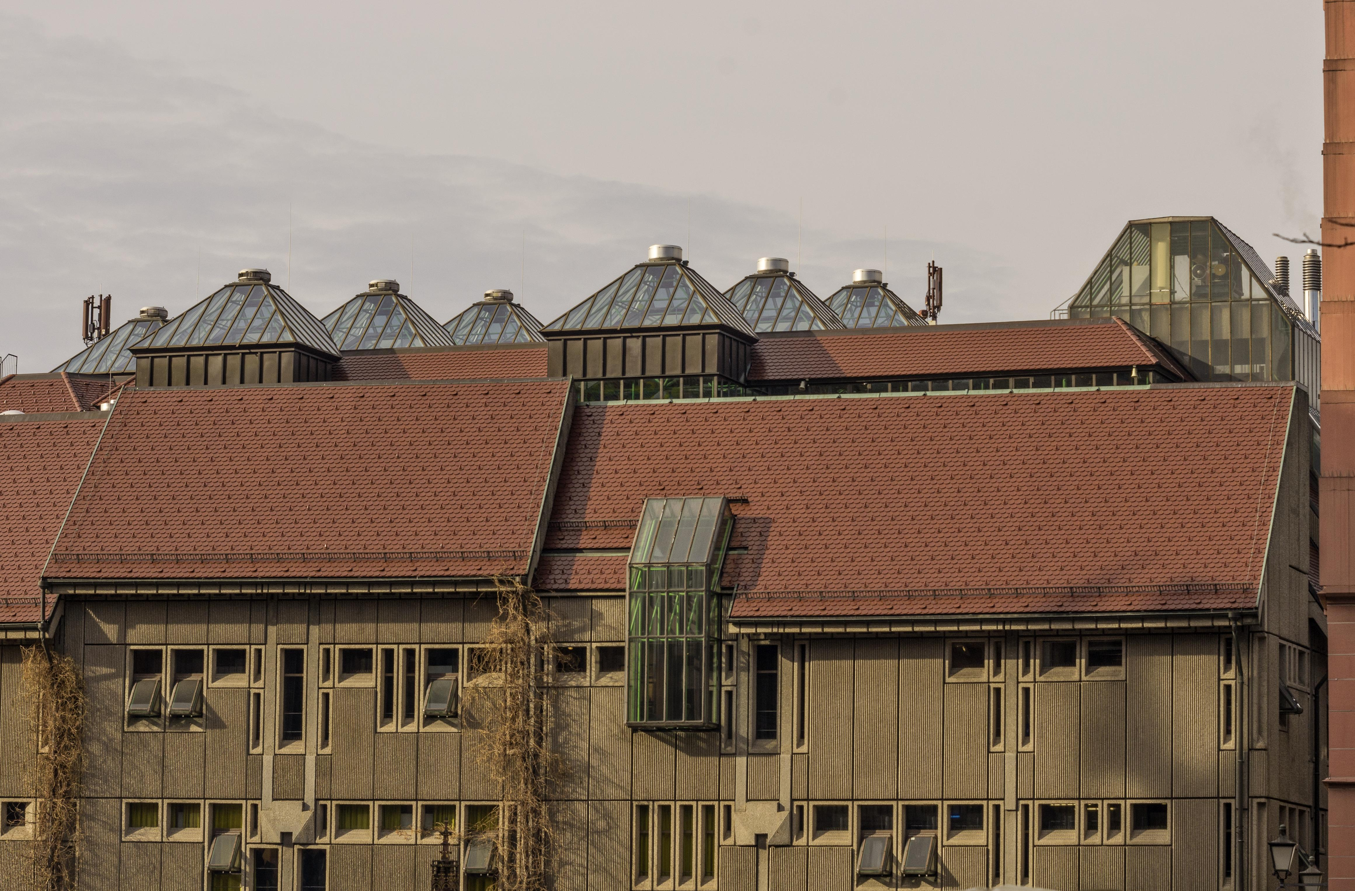 Bilder aus Freiburg im Breisgau Breuninger